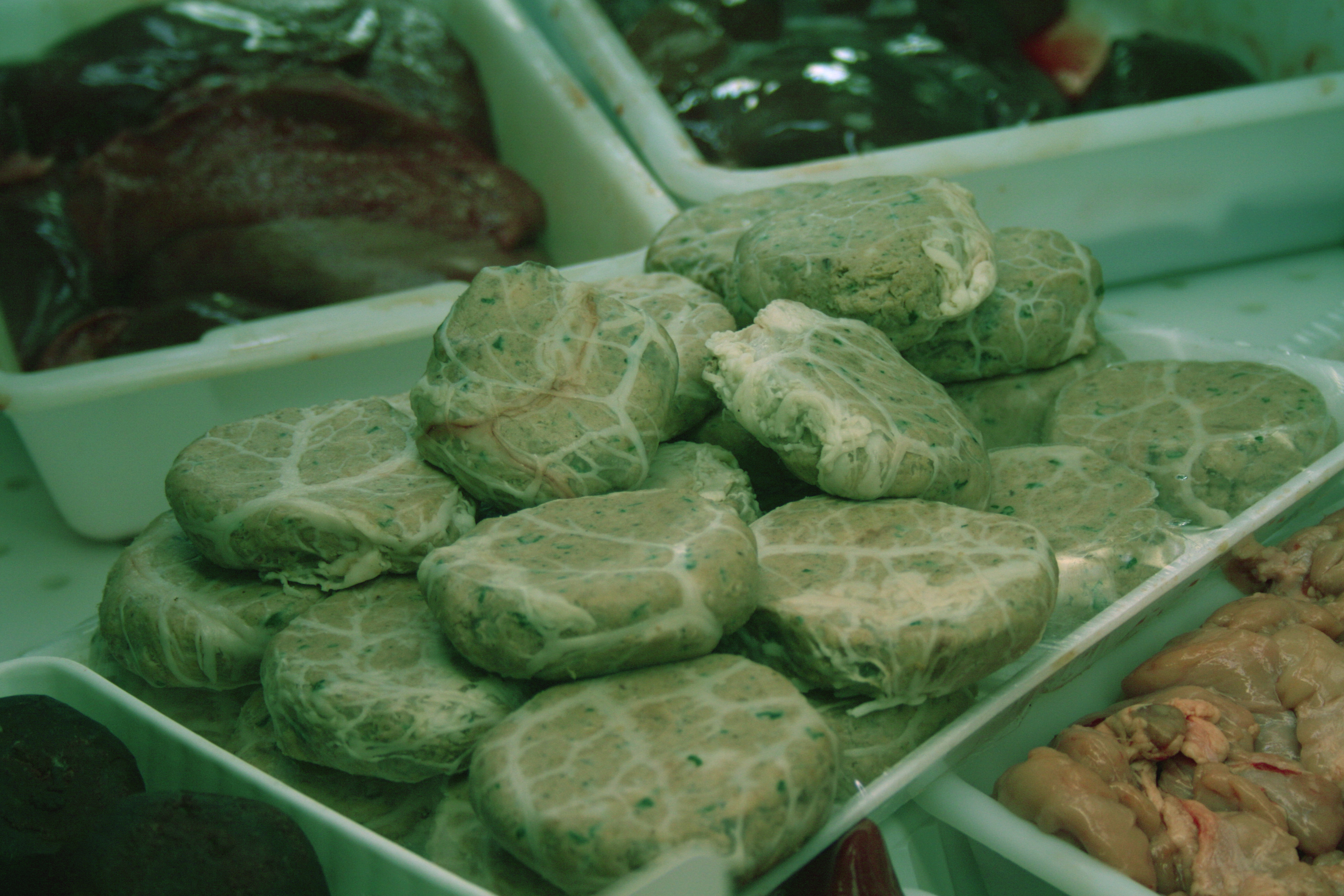 Fardel se trata de un producto de la matanza elaborado con una mezcla de hígado de cerdo envuelto en una tela del estómago